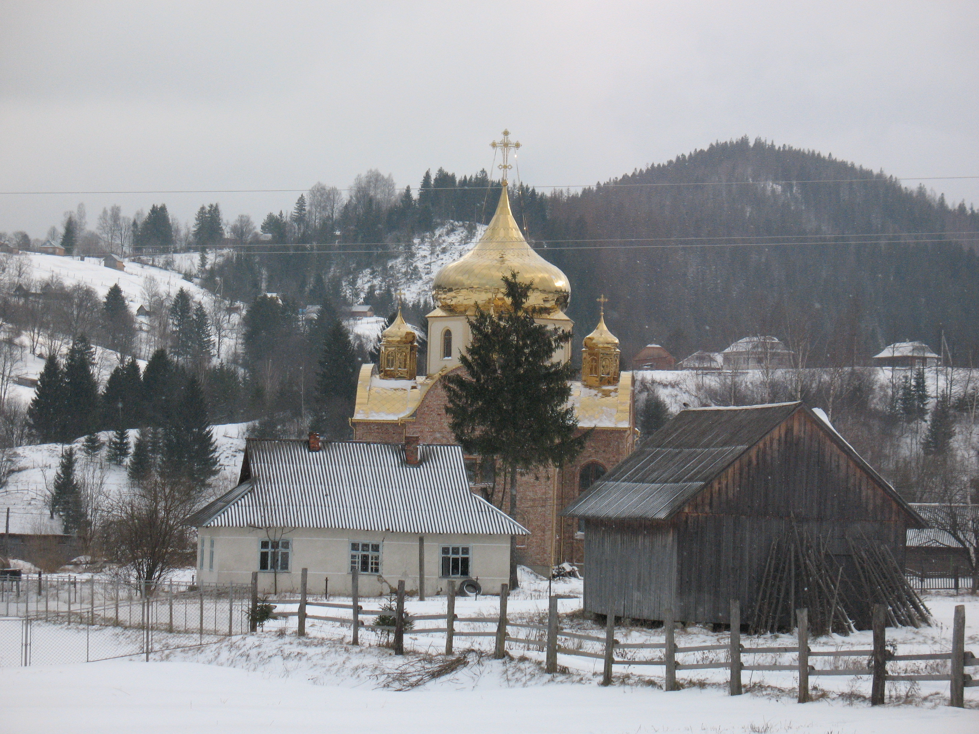 Село Брустурів у Косівському районі Івано-Франківської області України